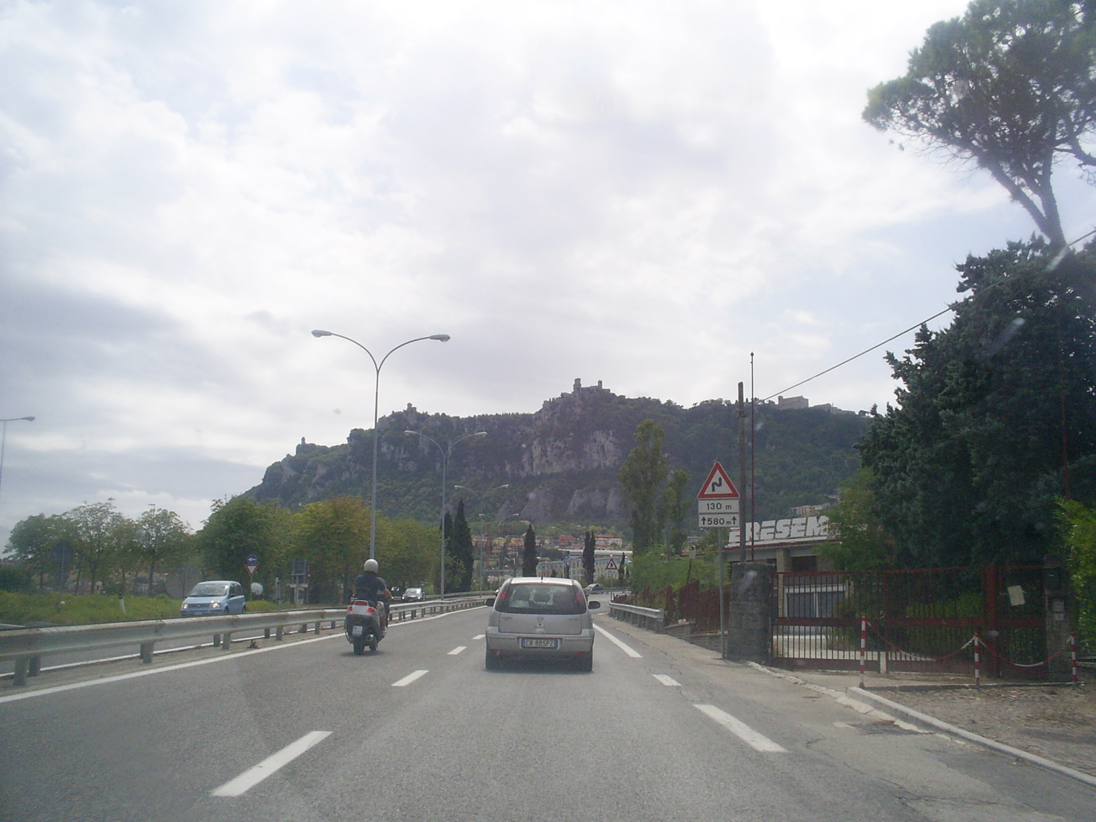 droga krajowa SS72 - Włochy